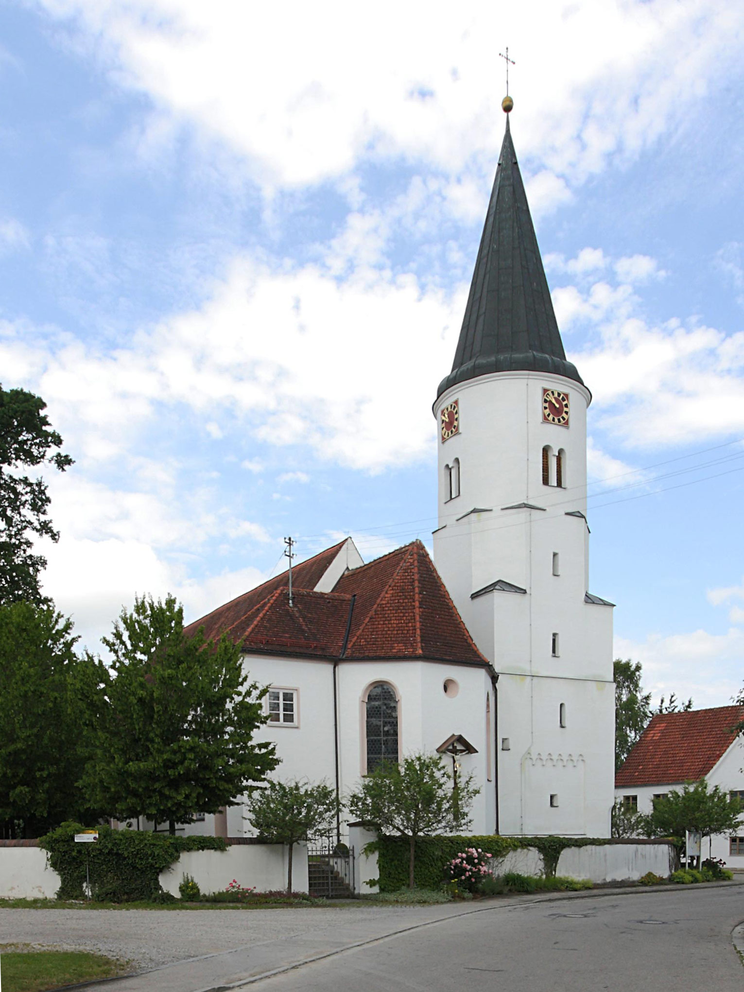 Pfarrkirche Hl. Kreuz, Aletshausen; Ansicht von Osten